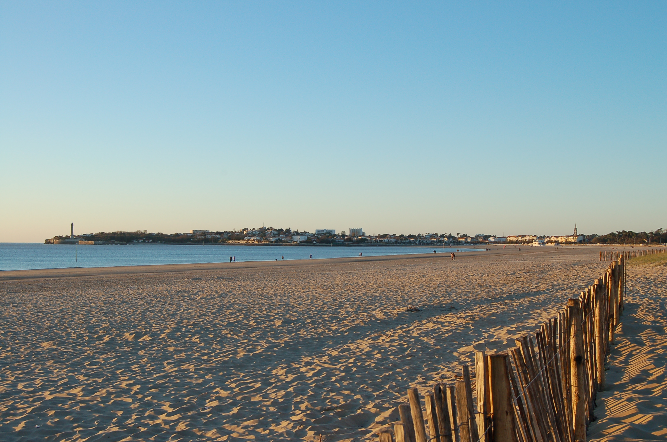 Plage et phare de St Georges de Didonne (France - Charente Maritime)